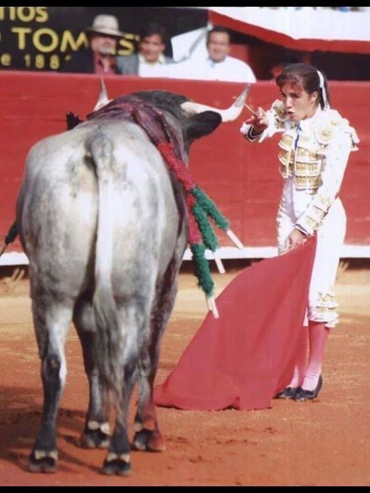 Hilda Tenorio entrando a matar al toro de su alternativa